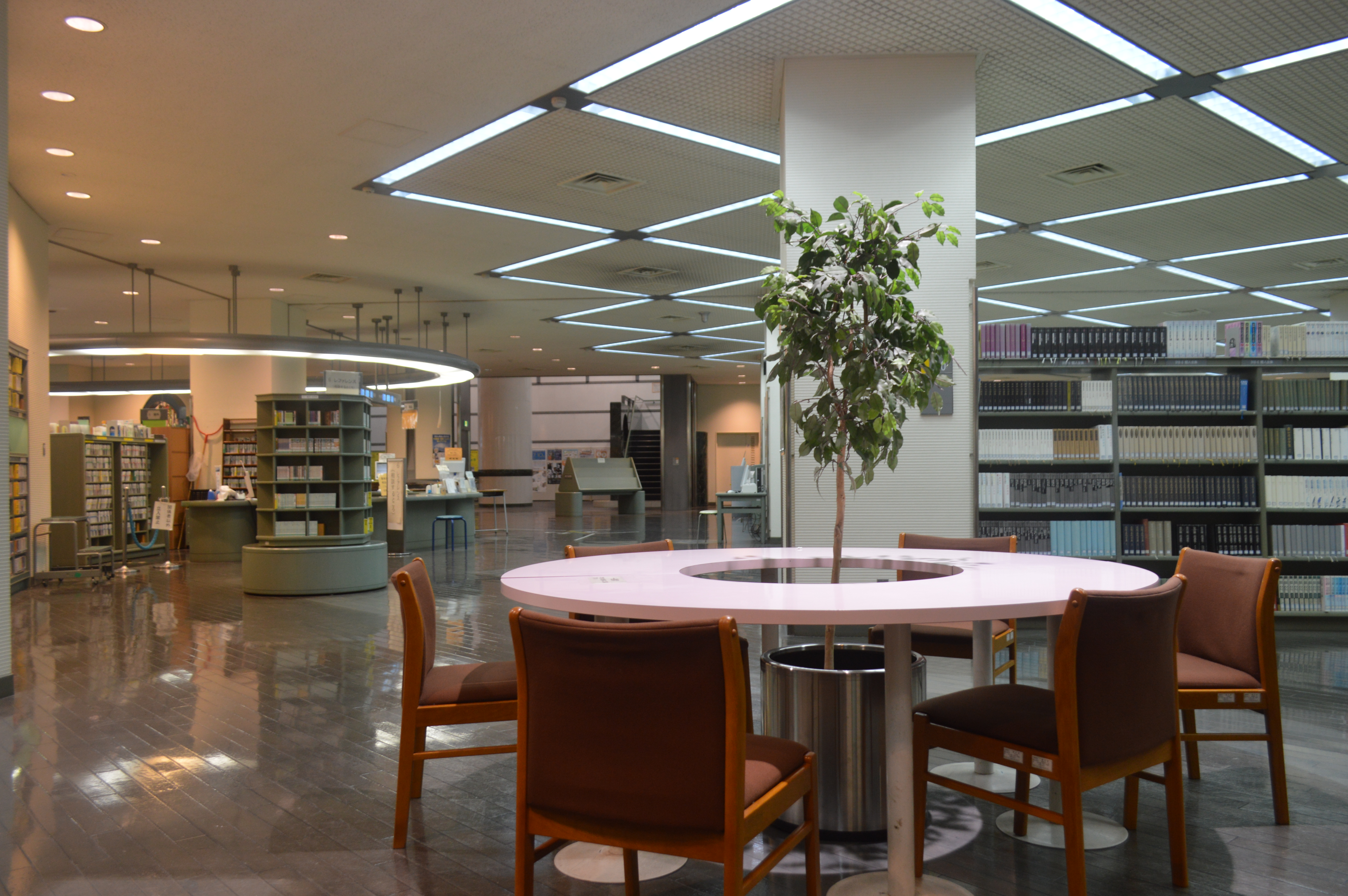 静岡市立清水中央図書館。旧清水市立中央図書館。静岡市立図書館のひとつ。